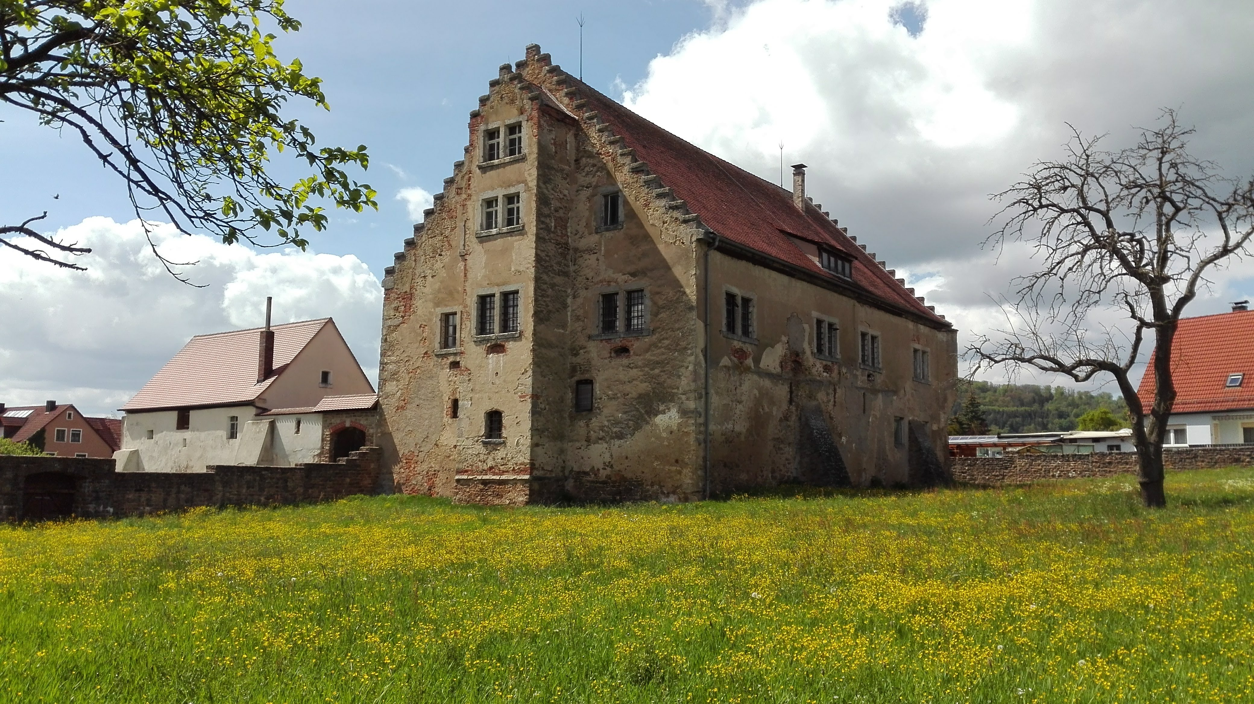 Palas Schloss Röckingen